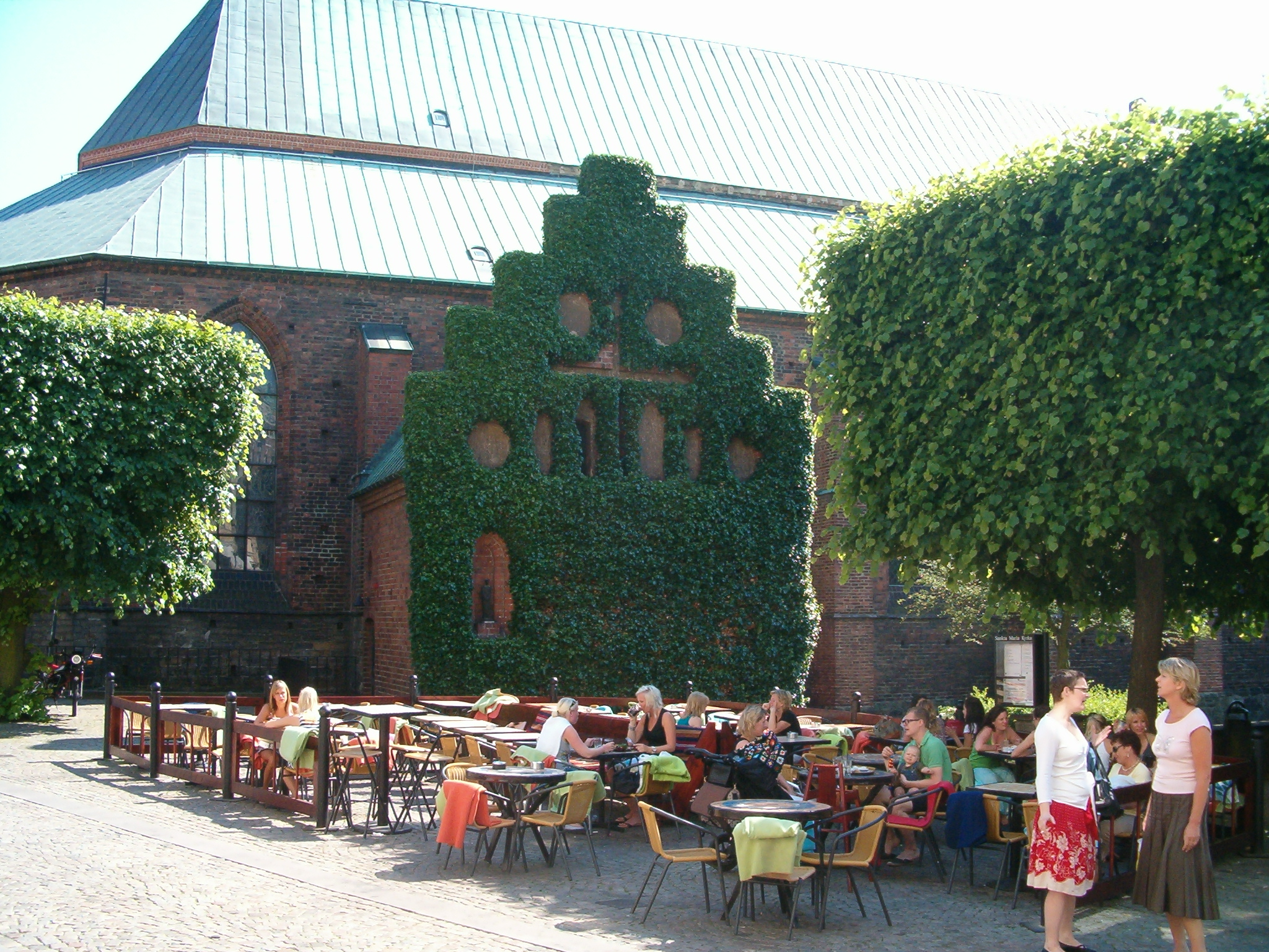 Uteservering vid Mariakyrkan i Helsingborg